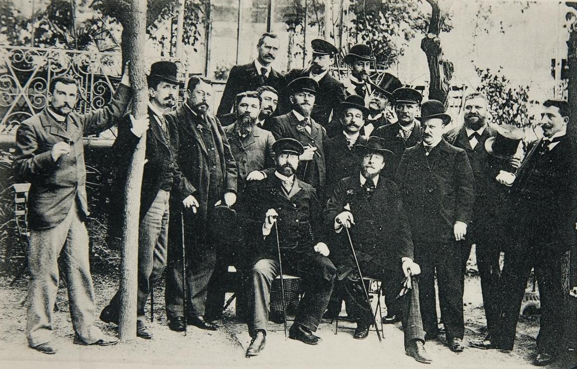 Légende de cette carte postale : "Paul Déroulède et Marcel Habert avec les conseillers municipaux nationalistes. Saint-Sébastien, 17 mai 1900." D'après L'Intransigeant du même jour, la délégation des conseillers municipaux nationalistes parisiens est composée de Jousselin [absent de cette photographie], Poirier de Narçay, Le Menuet, Galli, Méry, Foursin, Spronck, Tournade, Chérot, Barillier, Caron, Lepelletier, Pugliesi-Conti, Ballière, Dubuc et Bertrou, et accompagnée de MM. Dumonteil, Le Coutez, de l'avocat Reuillier, du peintre Delahaye et du sculpteur Pallez.